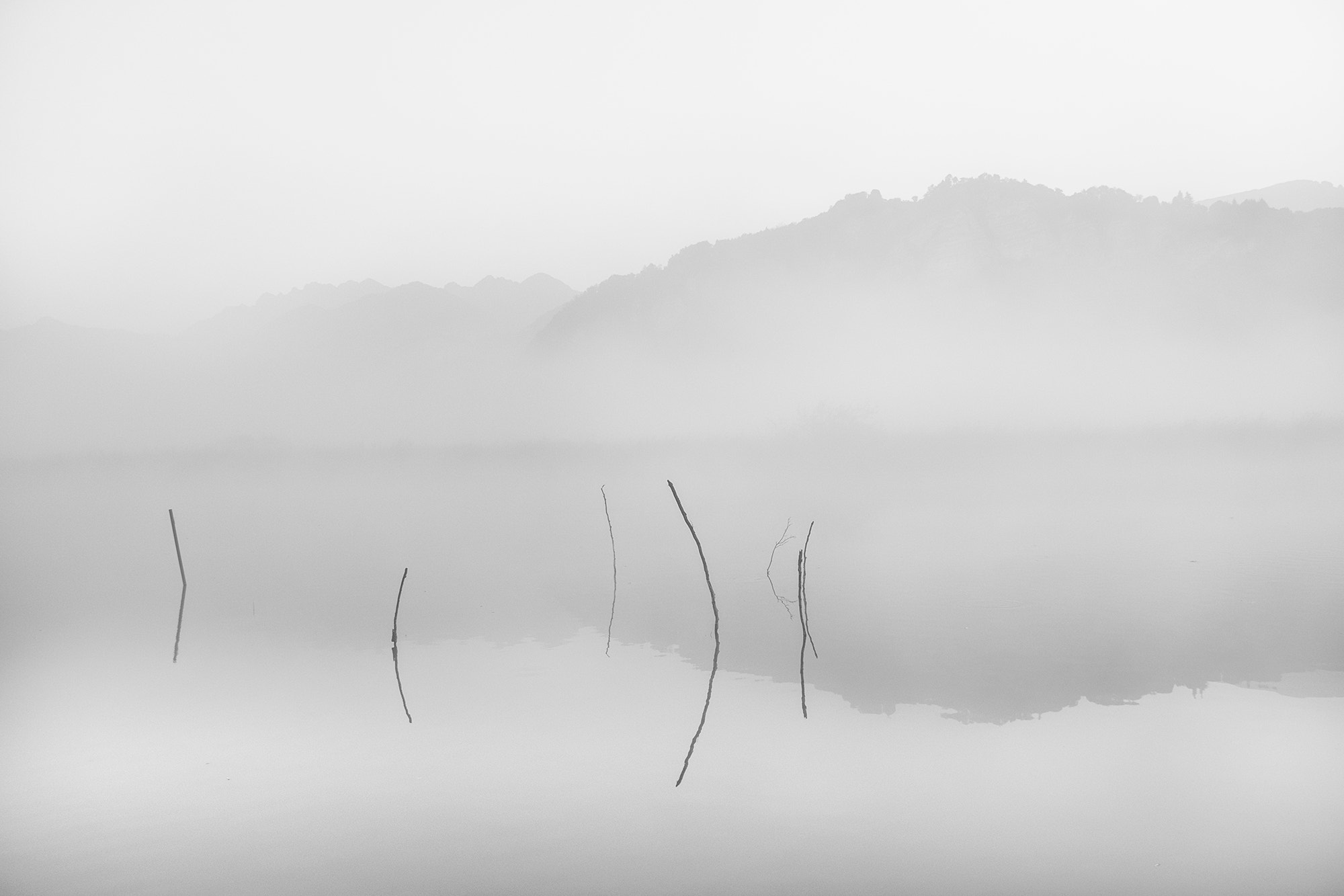 500px provided description: Minimal Airuno [#Airuno ,#Fog ,#Minimal ,#Nebbia ,#Adda]